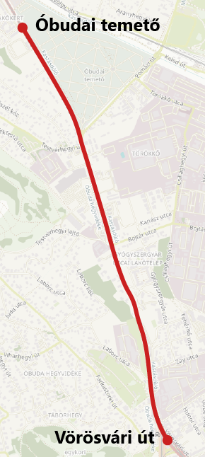 Az egykori óbudai trolibusz nyomvonala. This map may be incomplete, and may contain errors. Don't rely solely on it for navigation.